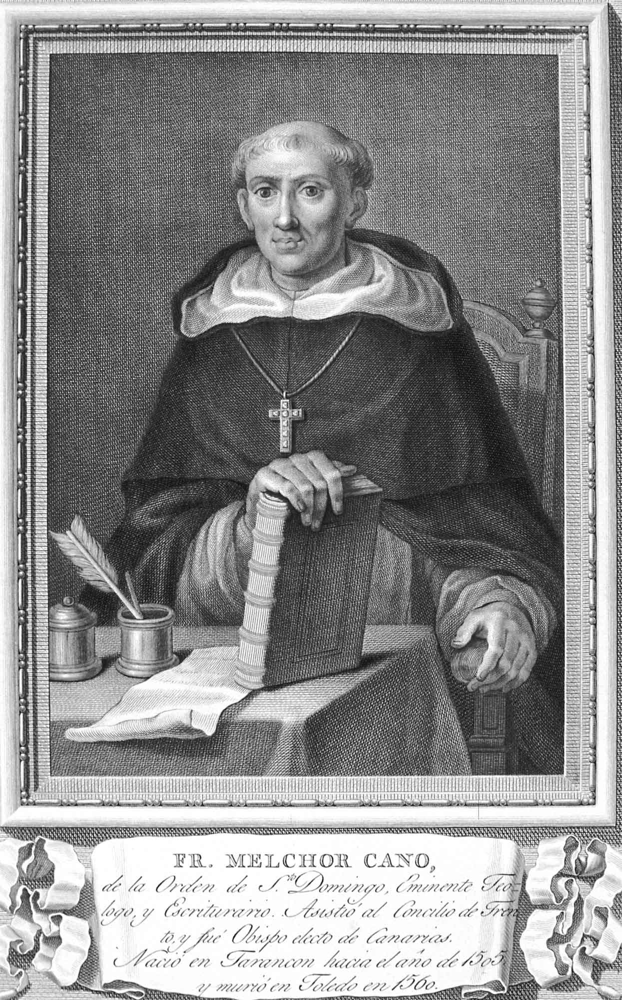 Retrato de Melchor Cano